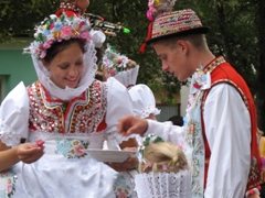 morkuvky hody 2006 kroj